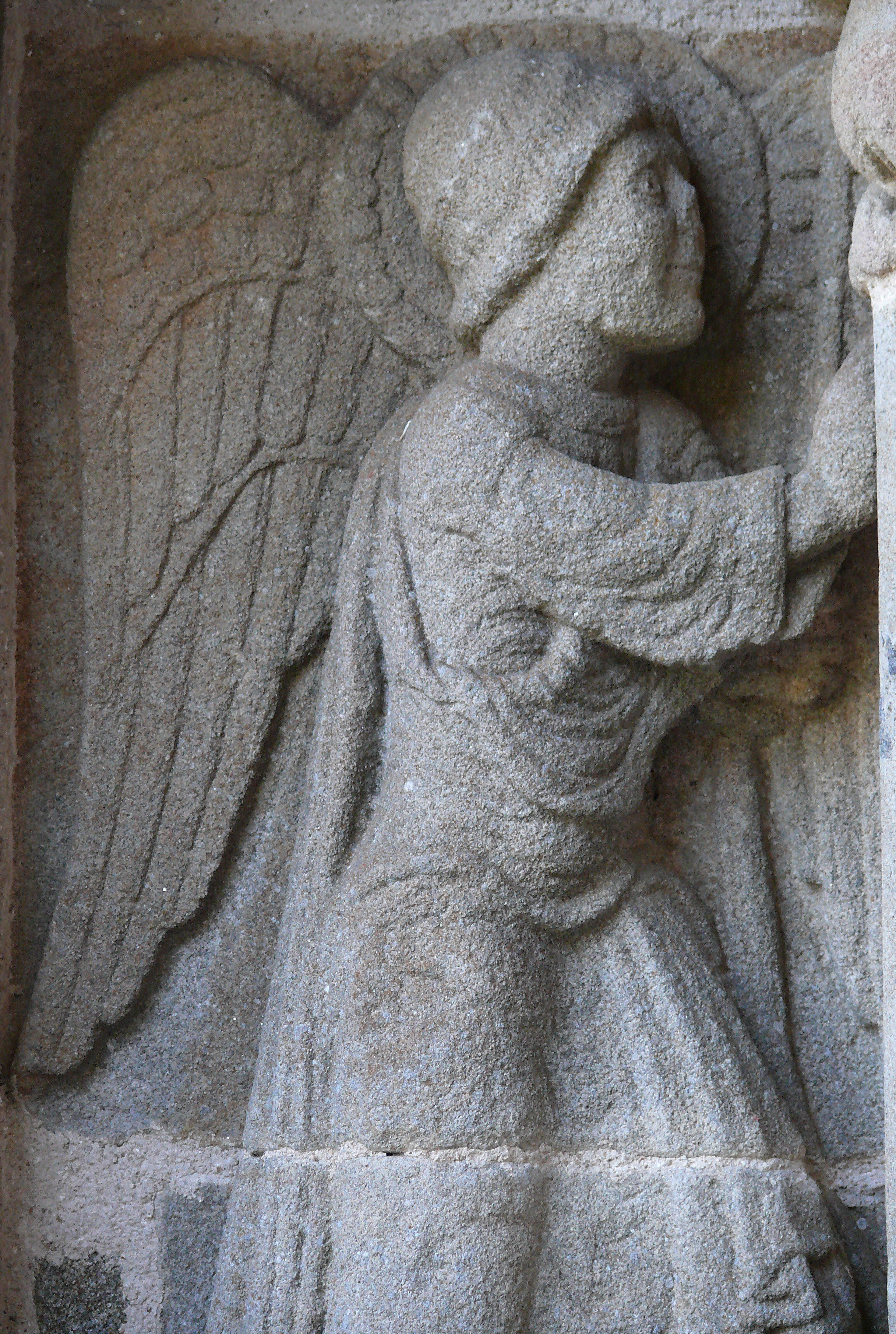 Ydes-Bourg - Eglise Saint-Georges - Porche ouest - Mur nord : l'Annonciation - l'Ange